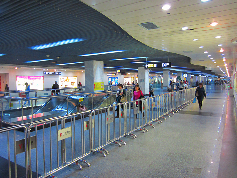 黃沙站1號線站廳